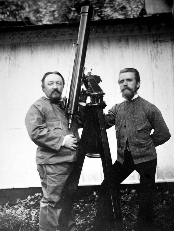 Konkoly-Thege Miklós (1842–1916) magyar és Hermann Kobold (1858–1942) német csillagász. Ismeretlen szerző fényképfelvétele (1880-as évek közepe)